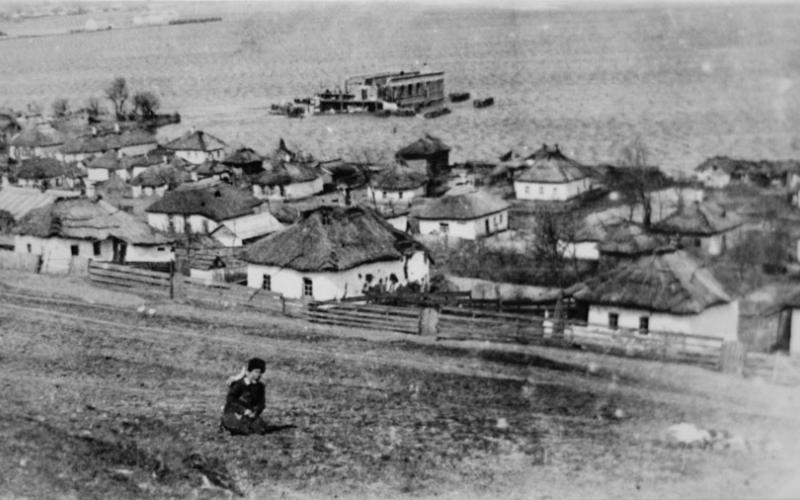 Старі фото Темрюка